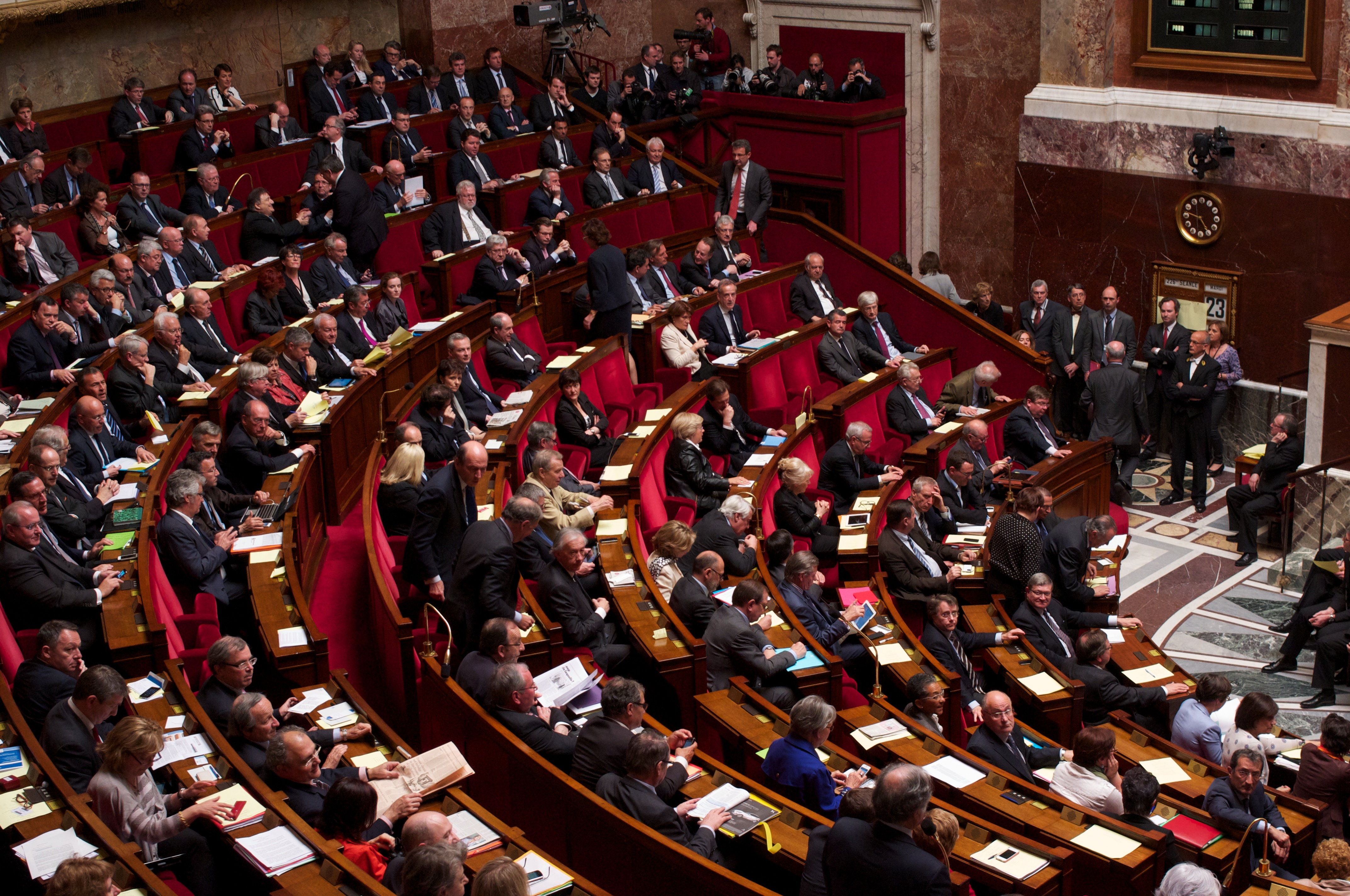 Bancs de l'opposition au vote solennel de la loi ouvrant le mariage aux couples de personnes de même sexe - Assemblée nationale